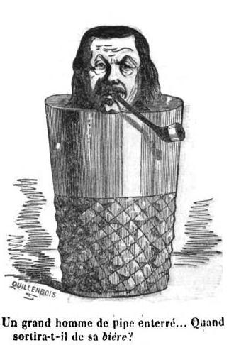 "Un grand homme de pipe enterré ... Quand sortira-t-il de sa bière ?"